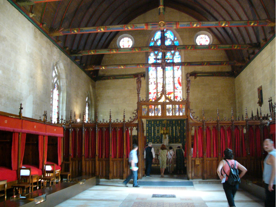 Der Armensaal des Hôtel-Dieu in Beaune